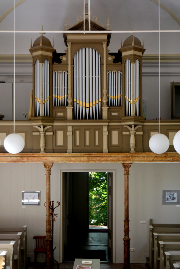 Skingen, Stevenstsjerke, oargel (Bakker & Timmenga)